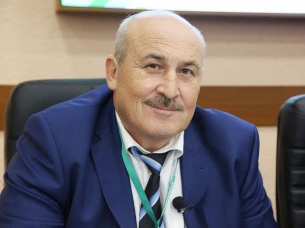 Габараев Олег Знаурович – заведующий кафедрой , профессор, доктор технических наук, Лауреат премии цветной металлургии СССР, Заслуженный работник высшей школы Российской Федерации, Заслуженный деятель науки Республики Северная Осетия-Алания, Заслуженный деятель науки Республики Южная Осетия, академик АГН РФ. награжден орденом «Дружбы», медалью «В ознаменование 20-летия Республики Южная Осетия», эксперт Рособрнадзора, федеральный эксперт научно-технической сферы и член Федерального УМО по УГСН «Прикладная геология, горное дело, нефтегазовое дело и геодезия», член экспертного совета по проблемам разработки месторождений твёрдых полезных ископаемых Высшей аттестационной комиссии Министерства образования и науки Российской Федерации.